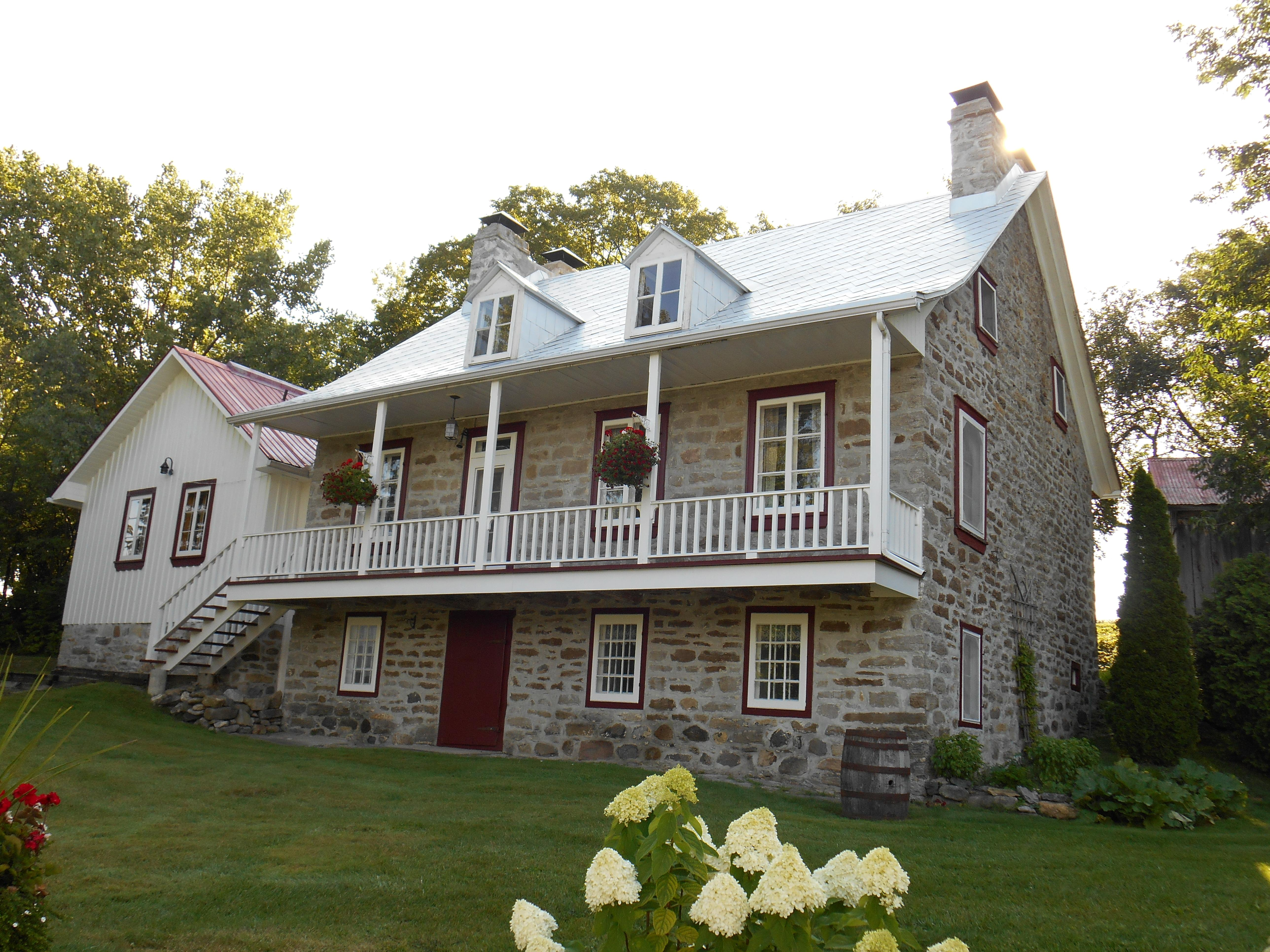 Maison Joseph-Labelle, 570, boulevard des Mille-Îles, Laval, Québec